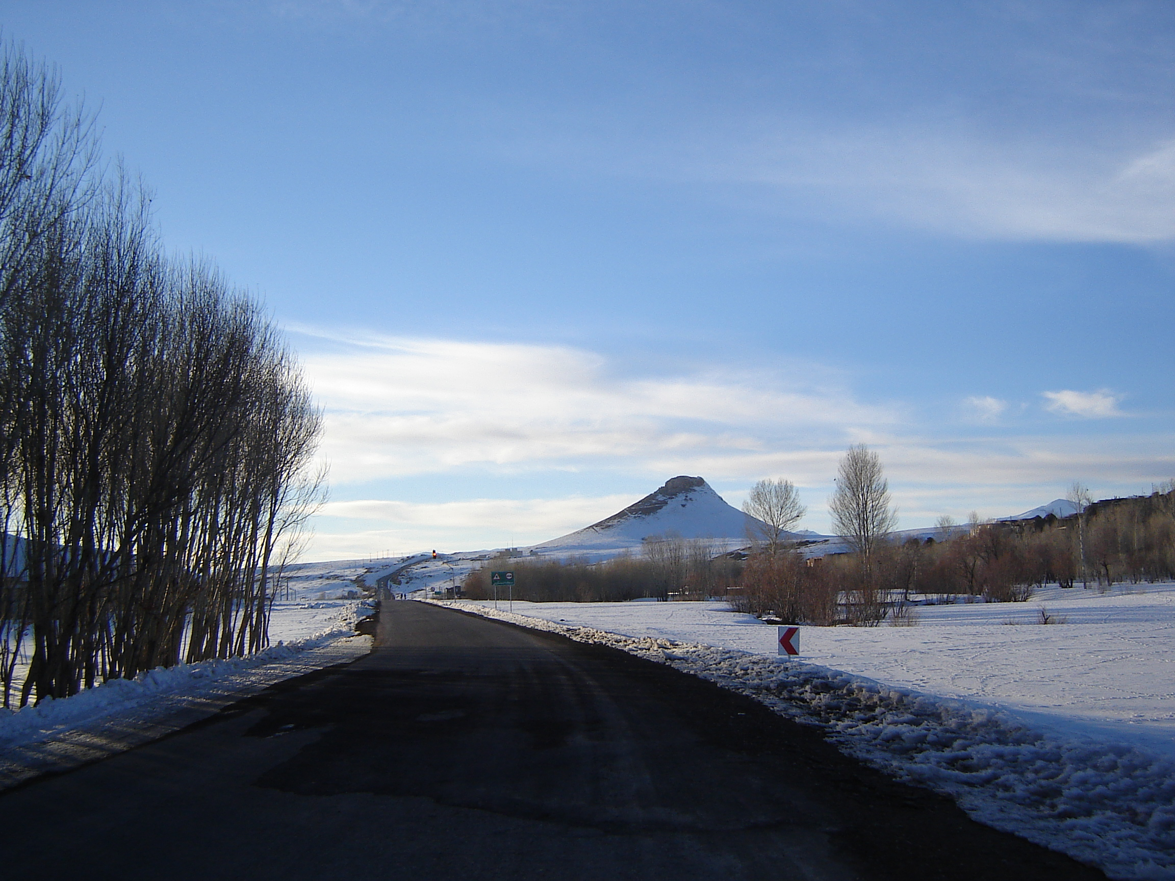 زمستان در تخت سلیمان